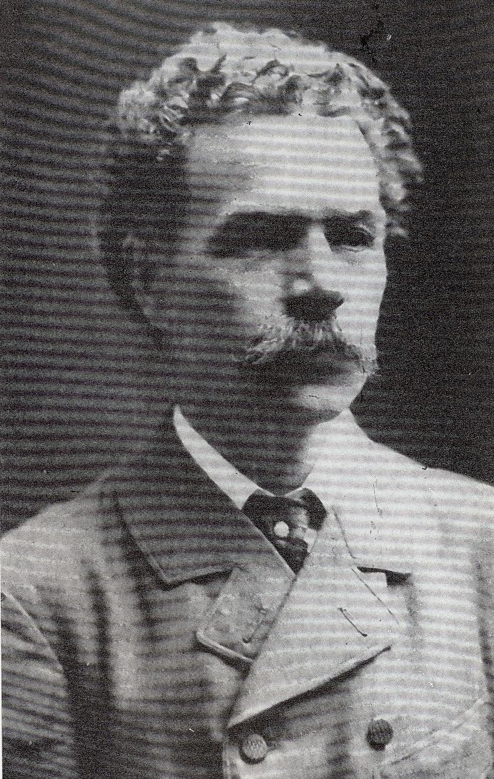 Jan Buchar (1859 - 1932), Český učitel a průkopník lyžování.